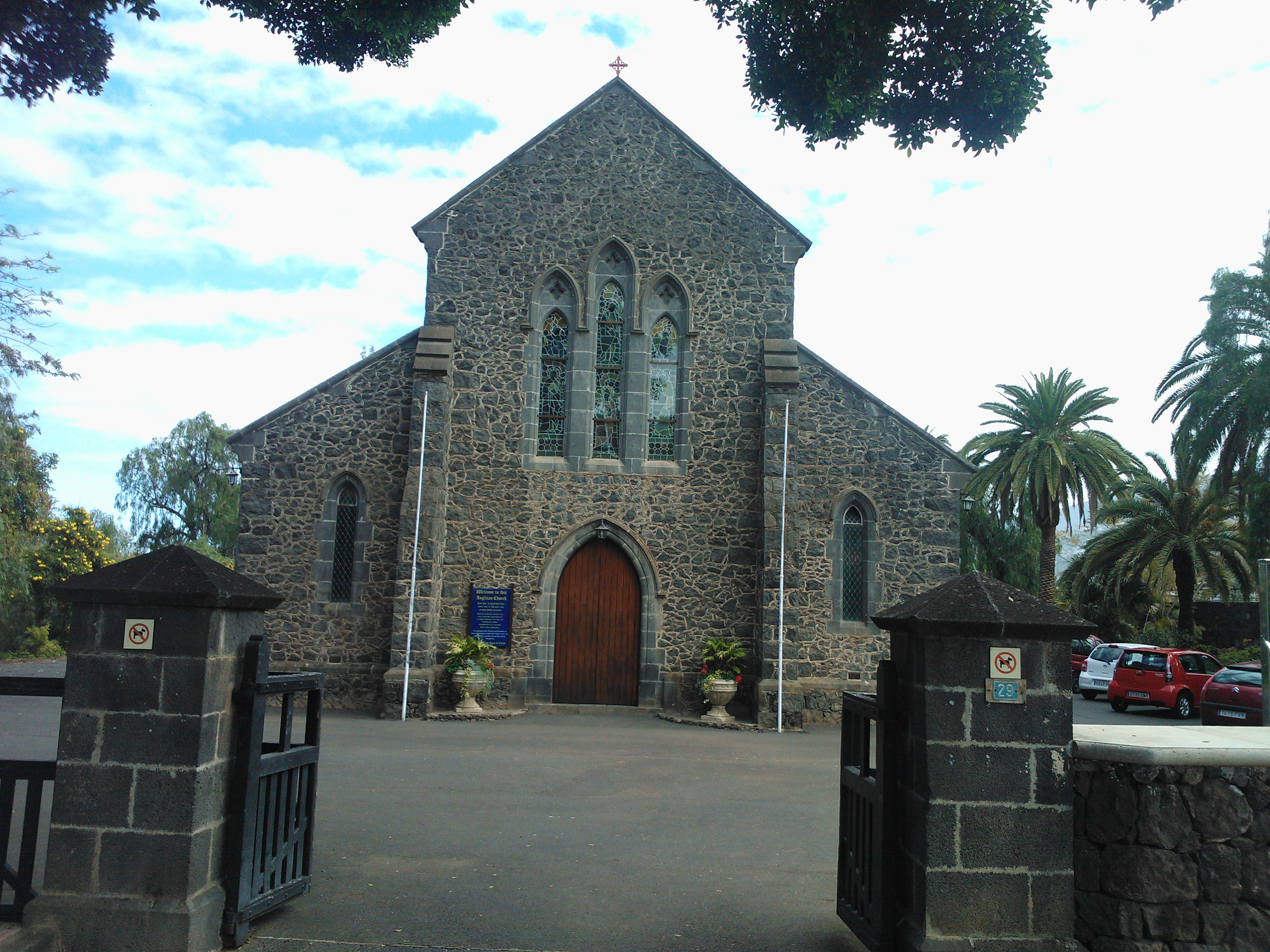 Англиканский храм Всех святых в Пуэрто-де-ла-Круз (Тенерифе)